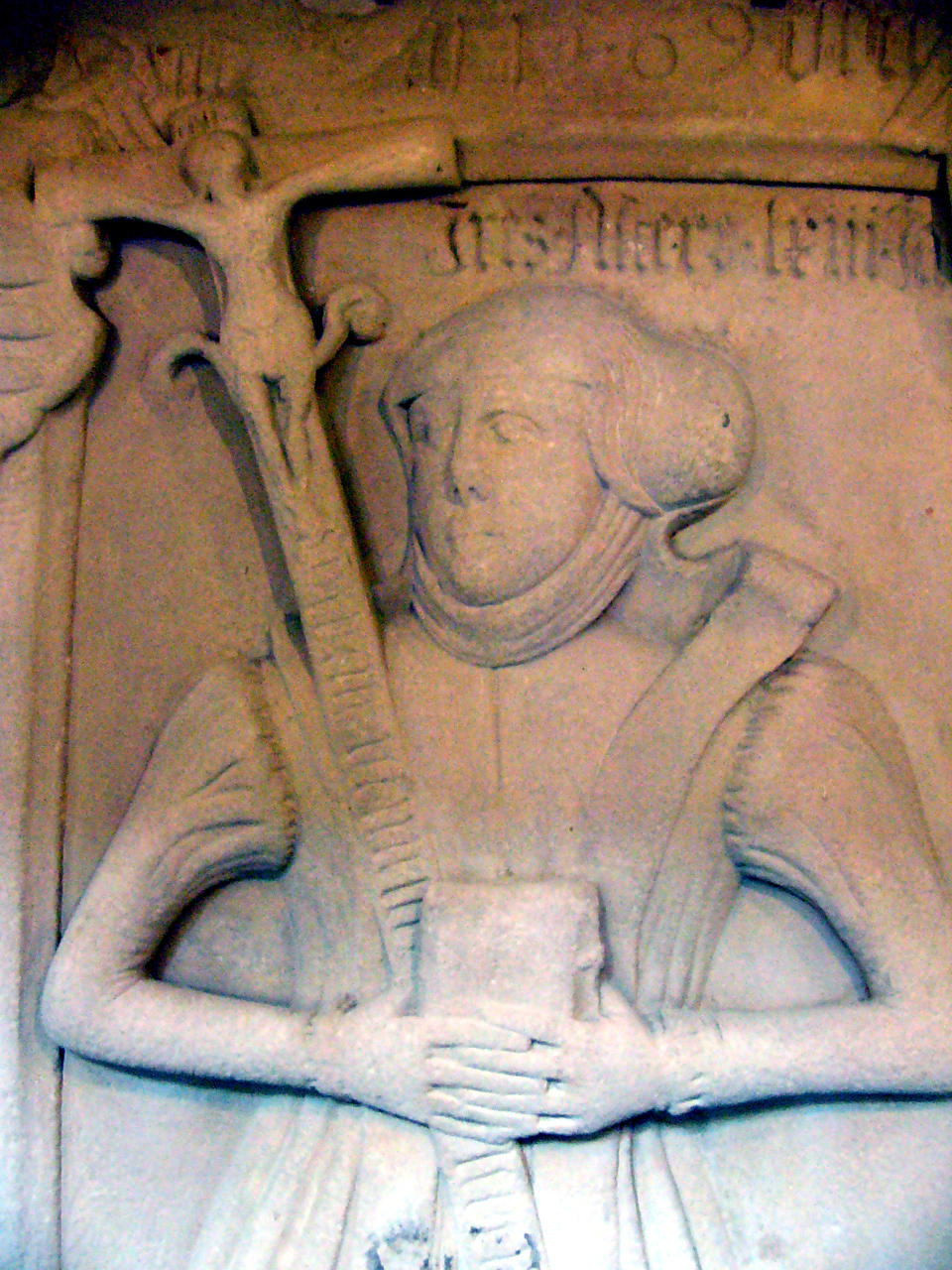 Ausschnitt aus dem Epitaph der letzten Äbtissin Margarethe von Döhla